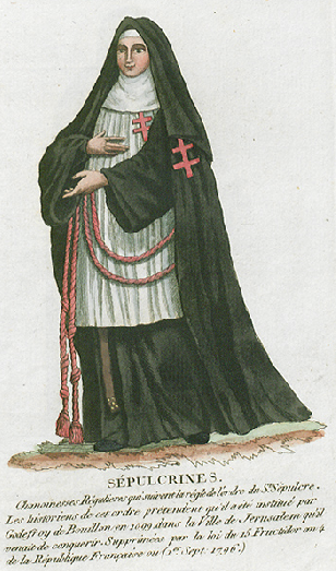 Collection de costumes de tous les ordres monastiques, supprimés à differentes époques, dans la ci-devant Belgique, Bruxelles, Philippe Joseph Maillart et sœur, 1811